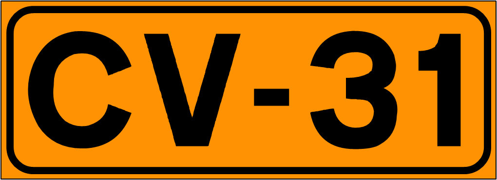 Inidcador de la Carretera de la Comunidad Valenciana CV-31